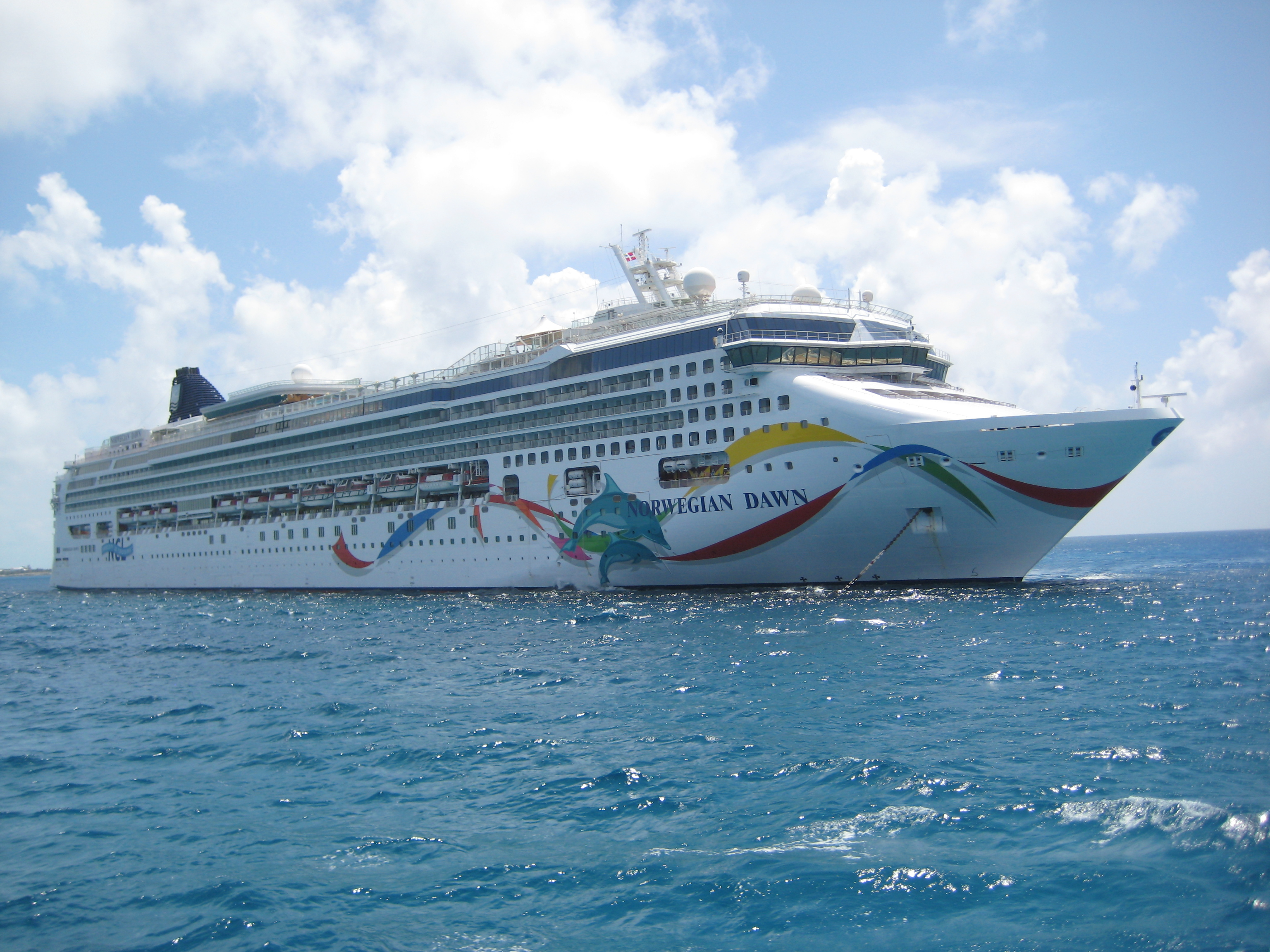 Das Kreuzfahrtschiff "Norwegian Dawn" vor dem "Great Stirrup Cay - Bahamas"